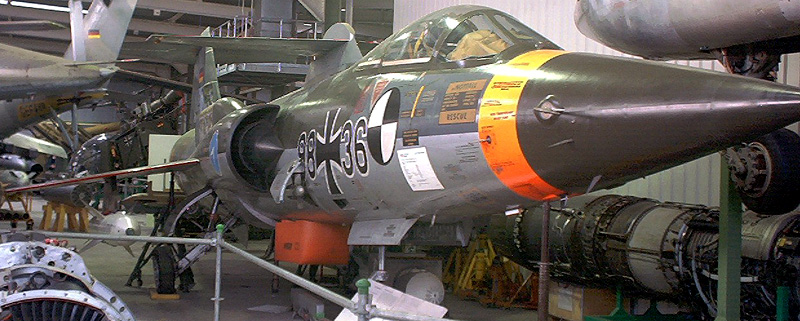 Lockheed F-104 Starfighter ausgestellt in der Wehrtechnischen Studiensammlung Koblenz.